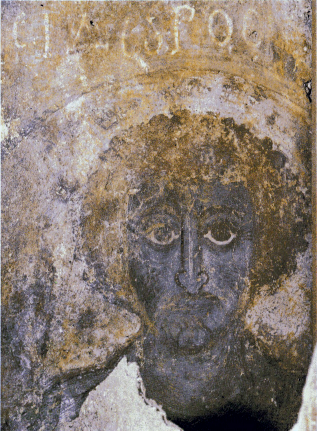 Αγιος Ισίδωρος στην Πρωτόθρονο Χαλκείου Νάξου